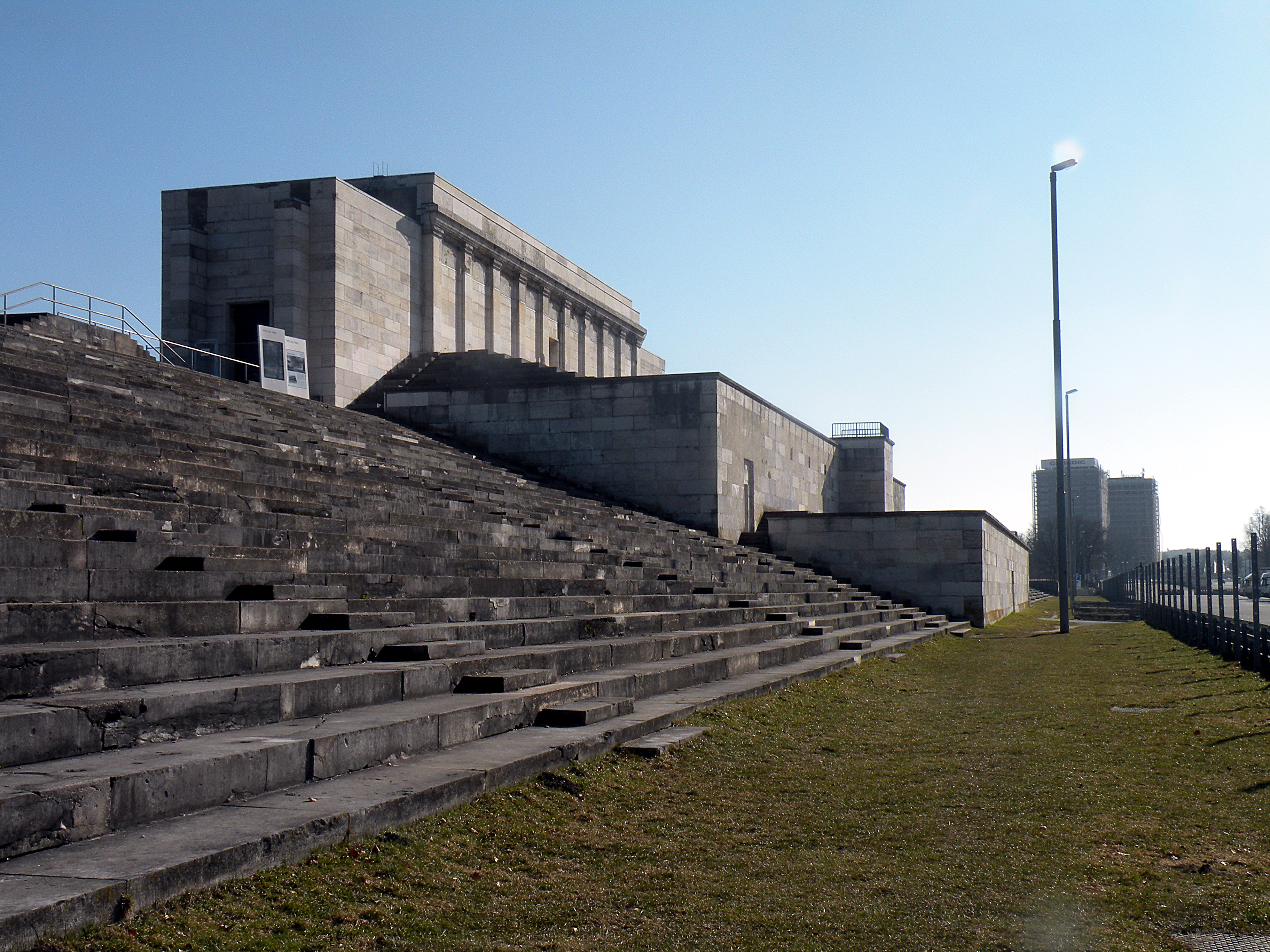 Центральный_зал_и_кафедра_форера.